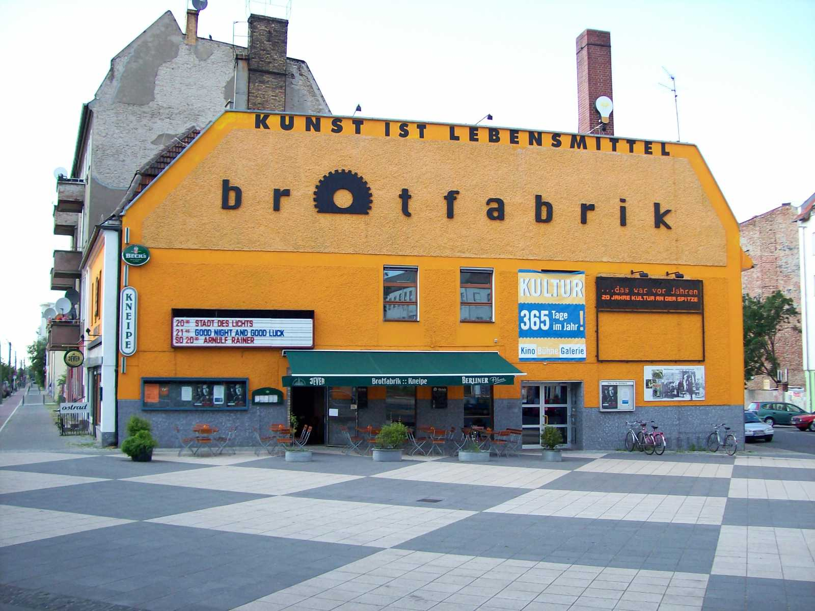 Wikipedia-Stammtisch in der Berliner Brotfabrik